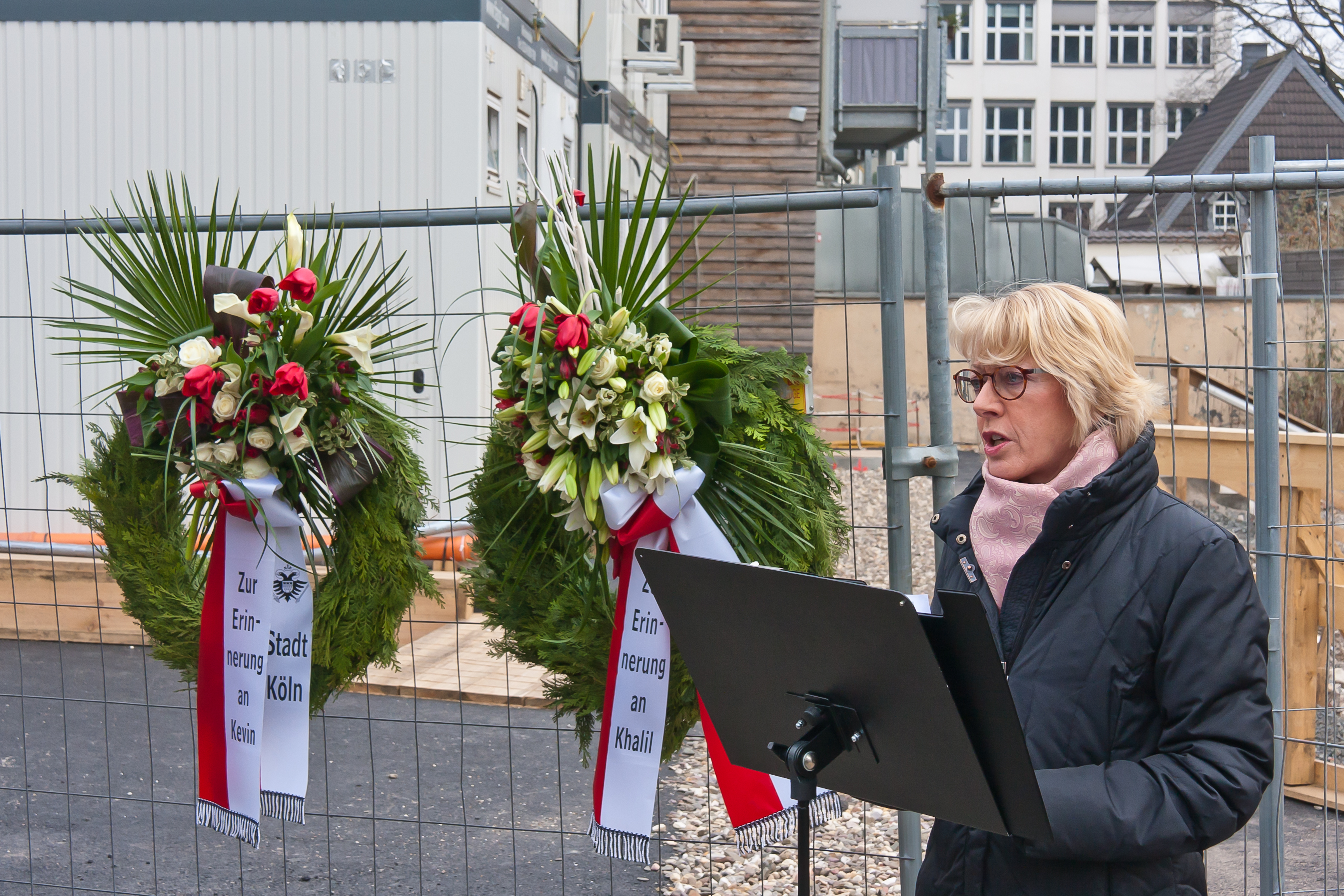 Gedenkfeier zum 4. Jahrestag des Einsturzes des Historischen Archivs Köln Foto: Ansprache durch Bürgermeisterin Elfi Scho-Antwerpes auf der Gedenkfeier der Stadt Köln an der Einsturzstelle. Links von ihr zwei Kränze der Stadt Köln zum Gedenken an Kevin und Khalil, die beim Einsturz ums Leben gekommen sind.